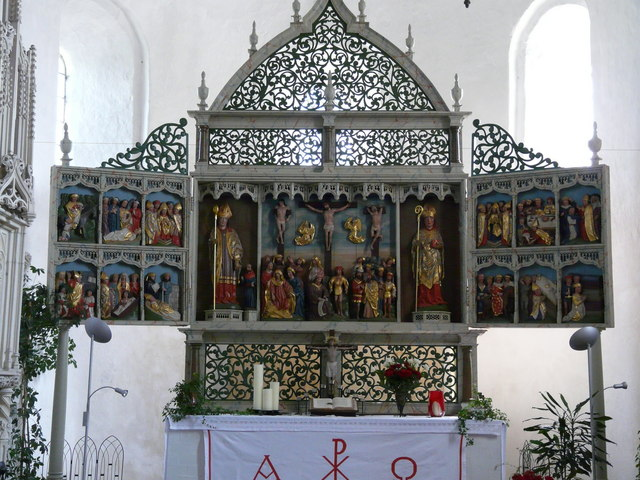 Kirchenaltar in der St. Martinskirche, Tettens (Altar in the Church of St Martin, Tettens)